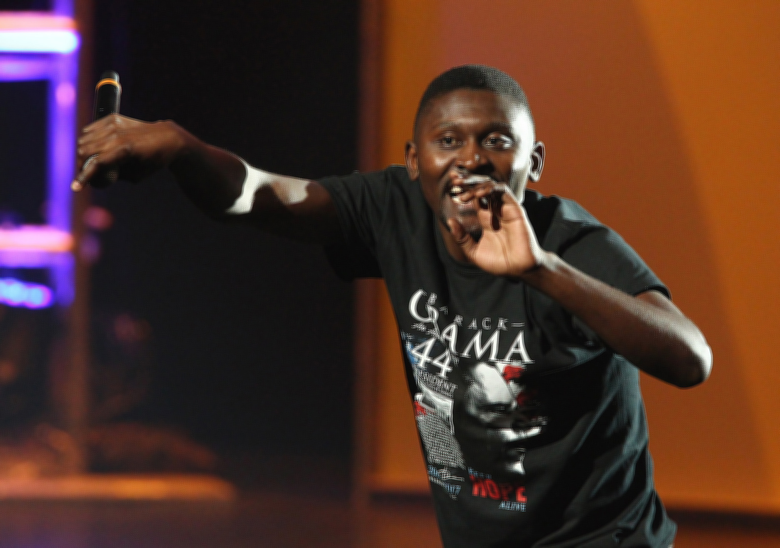 Chi-Chewa: Brian Mumba pa nthawi ya msonkhano wachitatu wa V